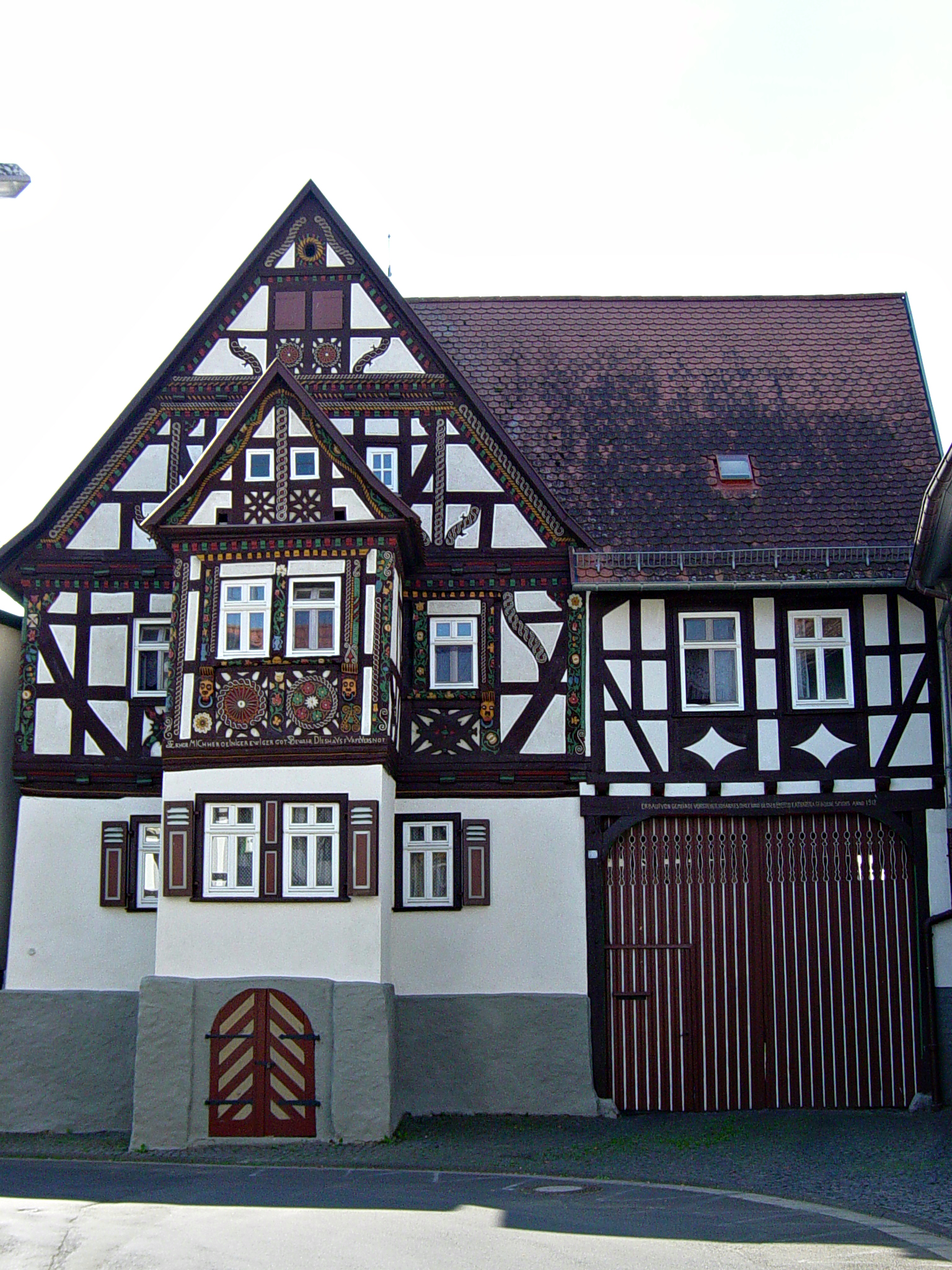 Ohly'sches Haus in Niederkleen (Ortsteil von Langgöns), Fachwerkhaus 1620, Anbau über dem Tor 20.Jhd